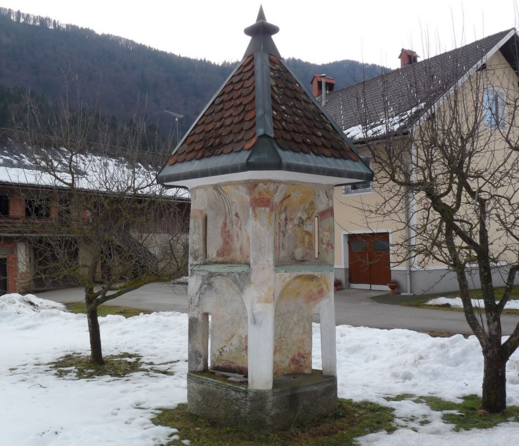 Layerjeve freske na znamenju v Zg. Lipnici